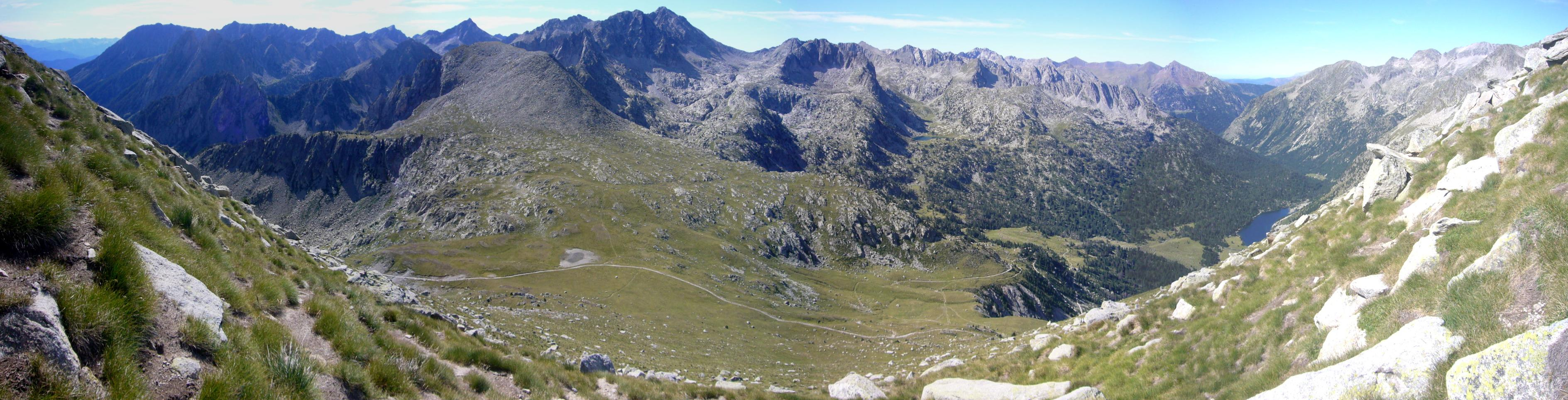 Portarró d'Espot vist en l'ascensió al Pic del Portarró; Espot, Pallars Sobirà, Catalunya